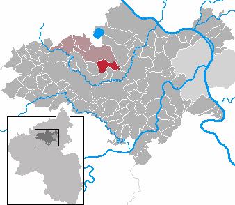 Thür in Rhineland-Palatinate - district Mayen-Koblenz